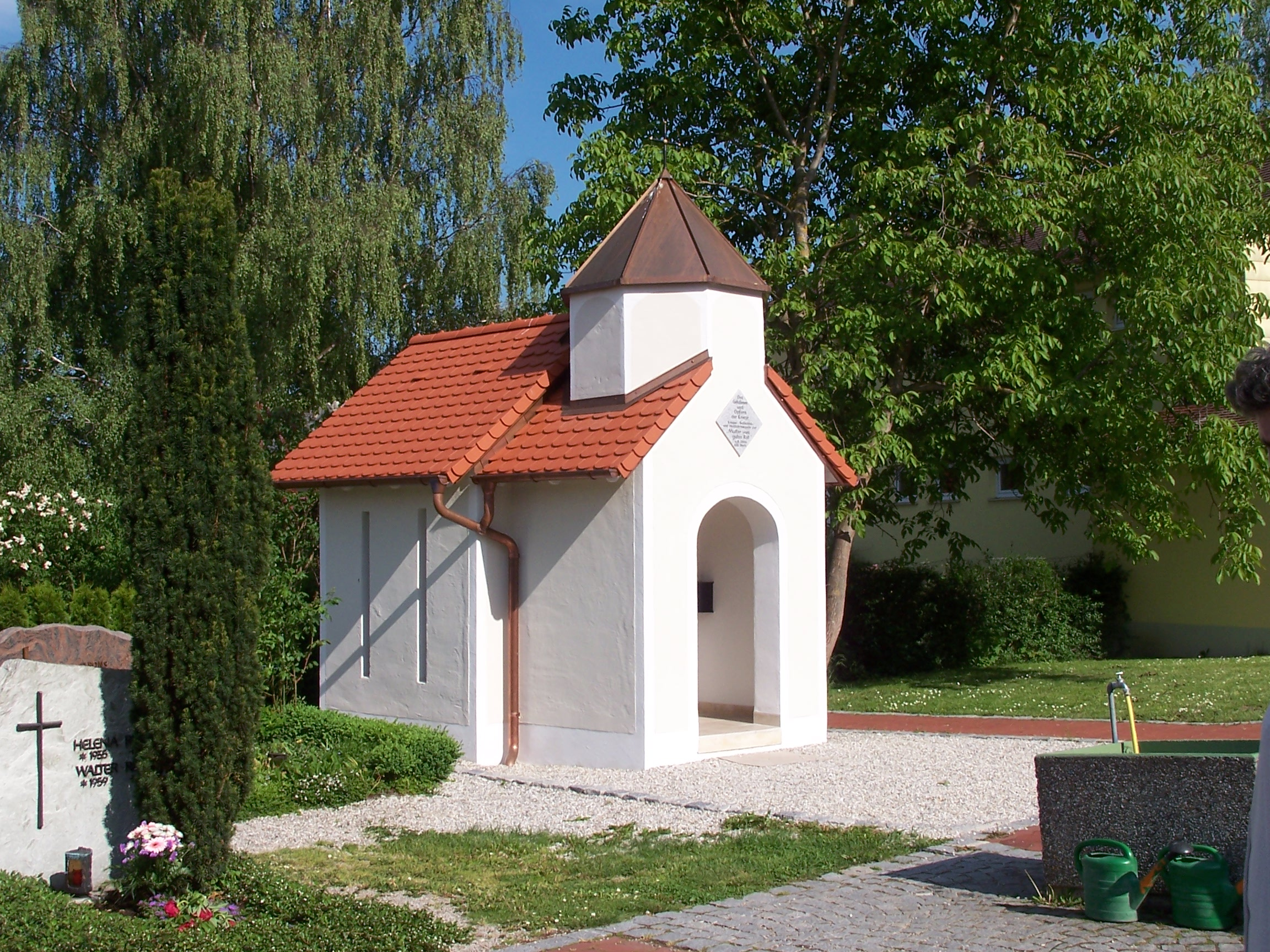 Wörth an der Isar. Landshuter Straße 55. Katholische Pfarrkirche St. Laurentius. Ein paar Meter ostlich der Kirche wurde 2006 die Kriegergedächtniskapelle und Kapelle zur Mutter vom guten Rat errichtet.